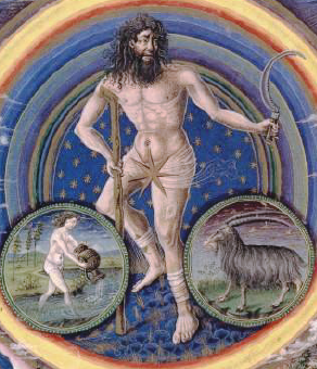 Dettaglio da "Saturno", miniatura dal codice italiano De Sphaera